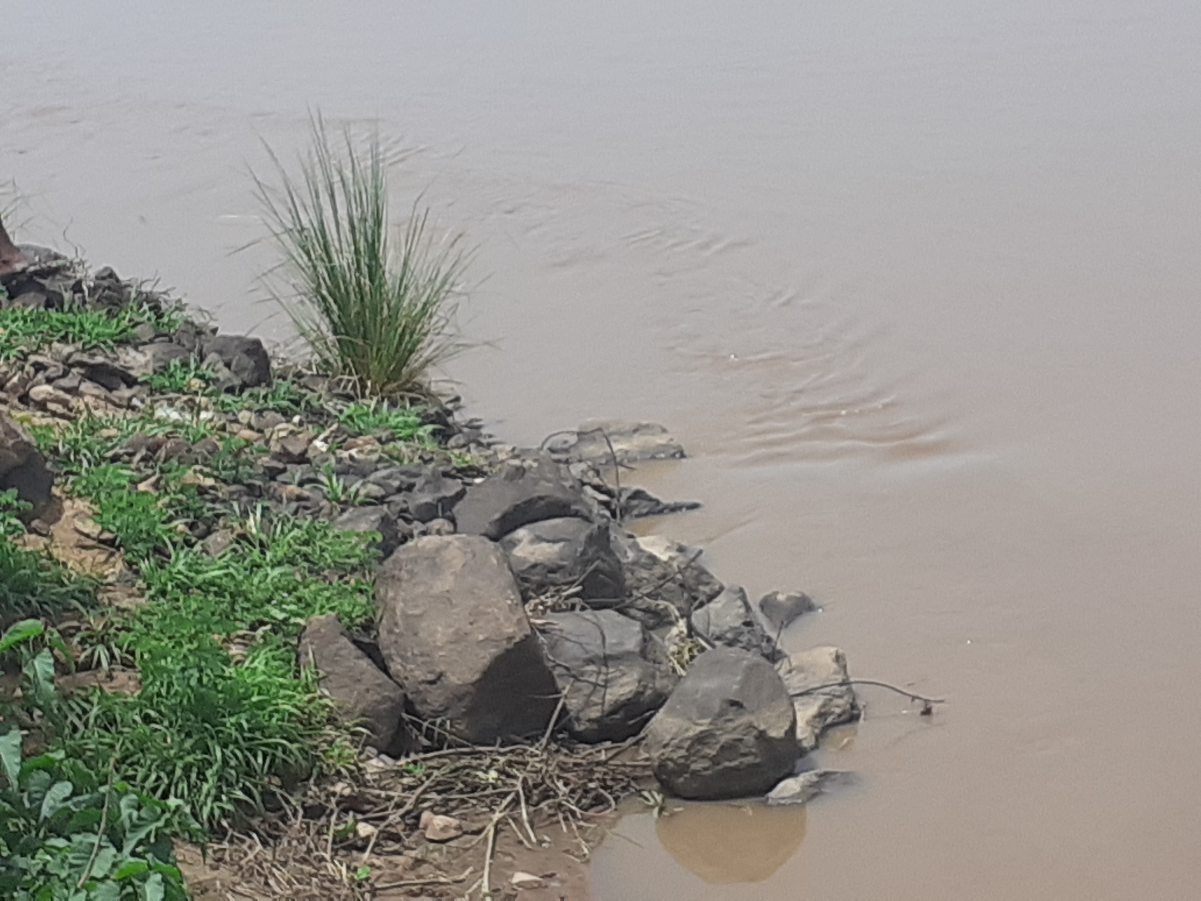 Espace de repos sur la rive de Zébé Marao Cameroun frontière avec le Tchad.